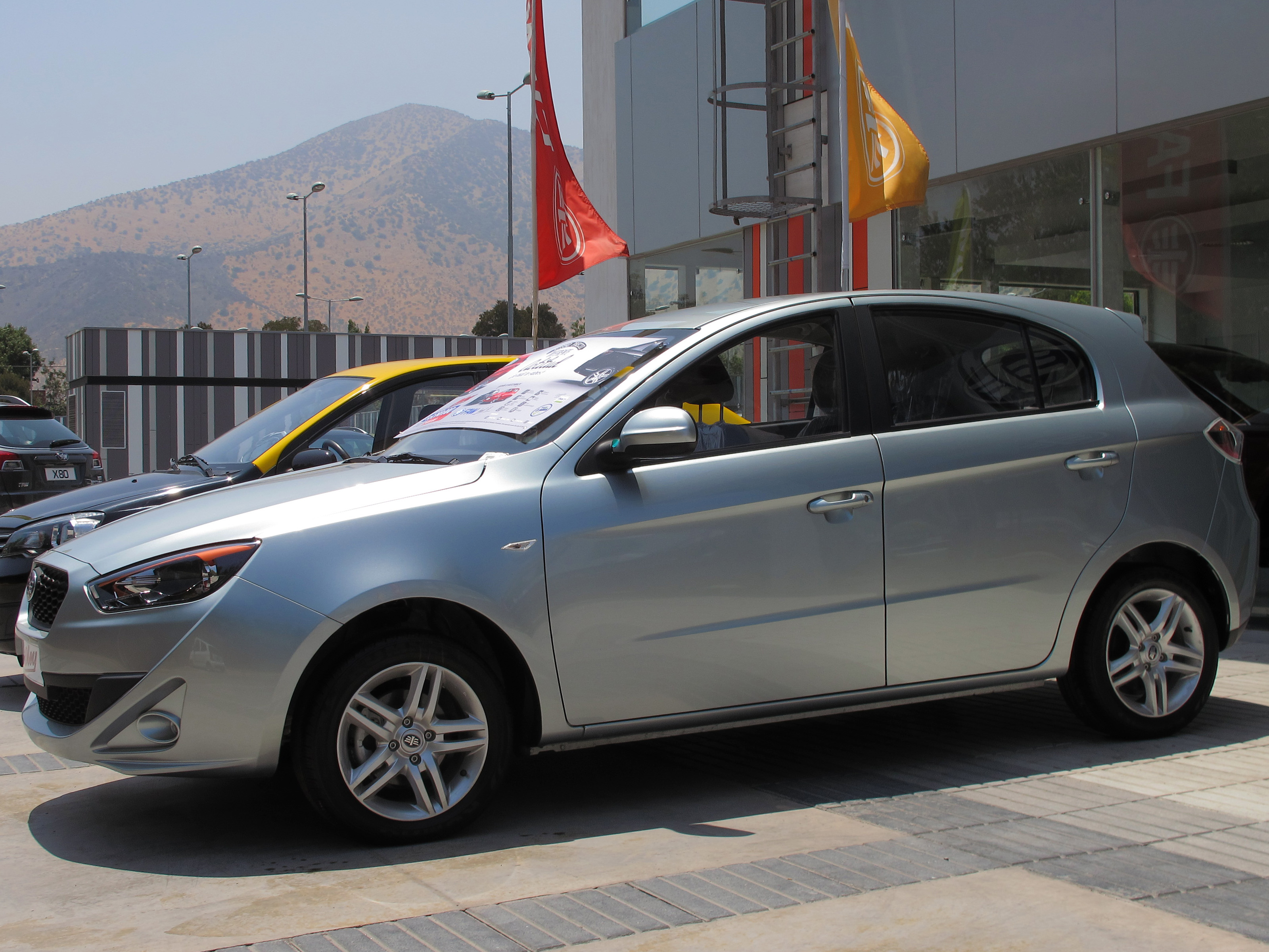 mas FEO que FAW